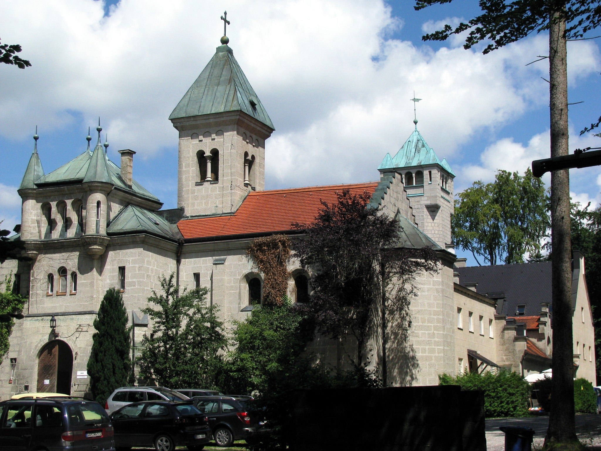 Schloss Seeburg, burgartige Anlage in neuromanischen Formen am Starnberger See Ostufer